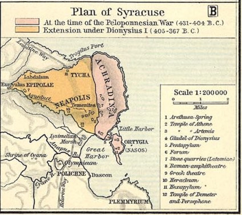 L'antica città di Syracusae